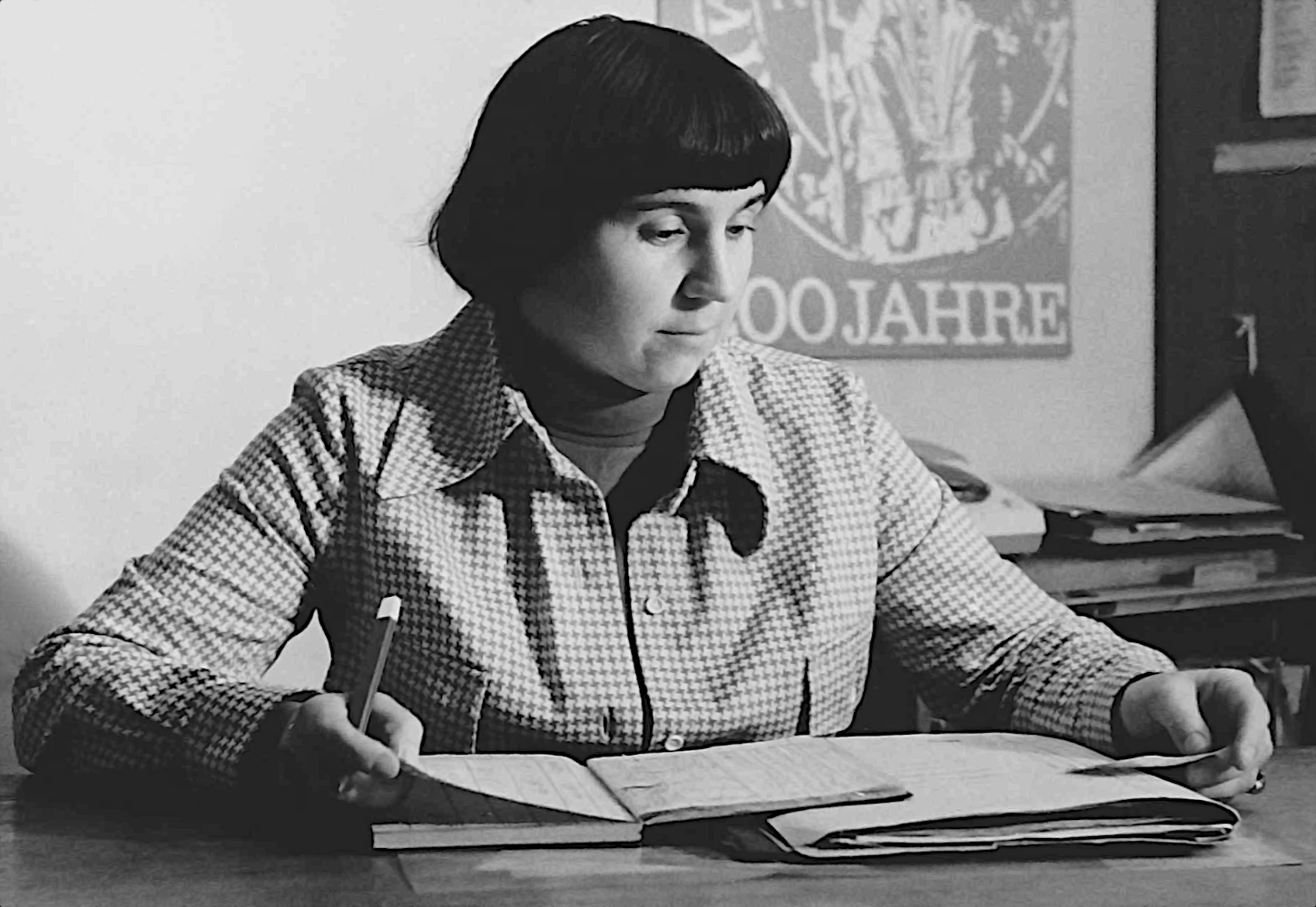 Dieses Bild zeigt die Schriftstellerin Charlotte Bechstein im Jahr 1978